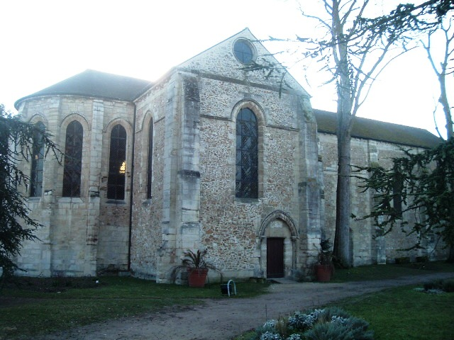 Commanderie de Saint-Jean-en-L'Isle de Corbeil-Essonnes (91).